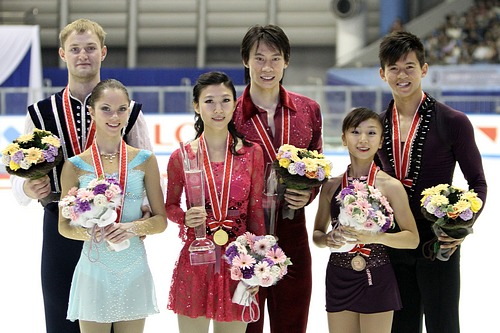 Vera Bazarova / Yuri Larionov (2), Pang Qing / Tong Jian (1) and Narumi Takahashi / Mervin Tran (3) at the 2010 NHK Trophy.